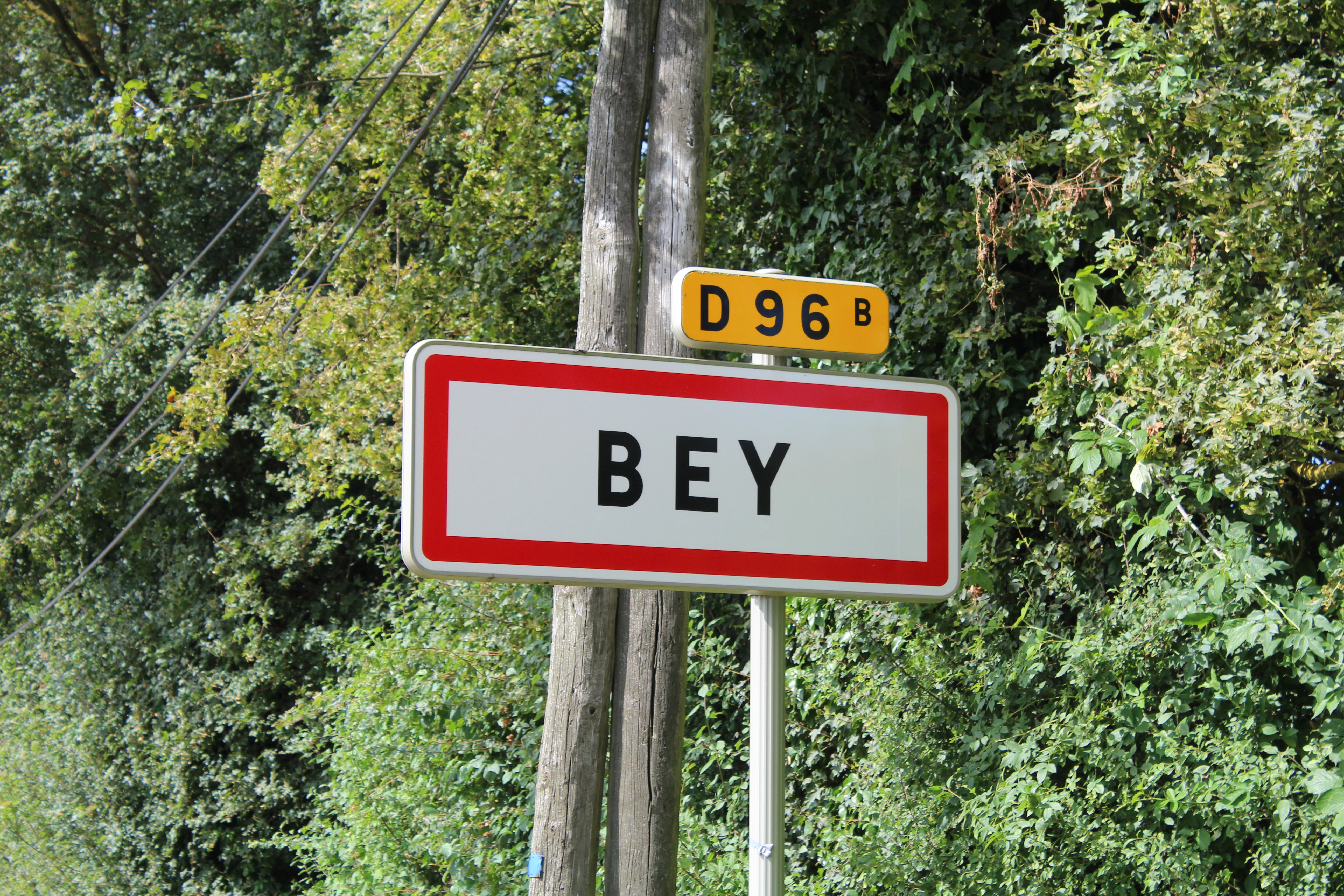 Panneau d'entrée de Bey dans l'Ain sur la route départementale D96b.